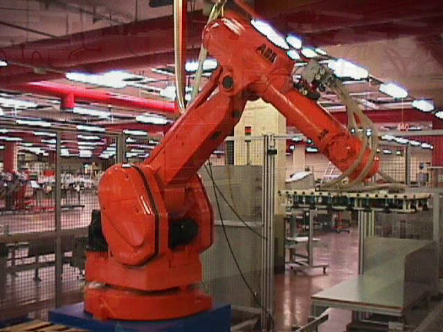 Verpackungsroboter